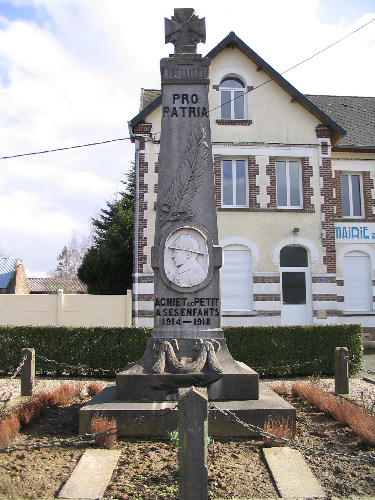 Monument aux morts d'Achiet-le-Petit.